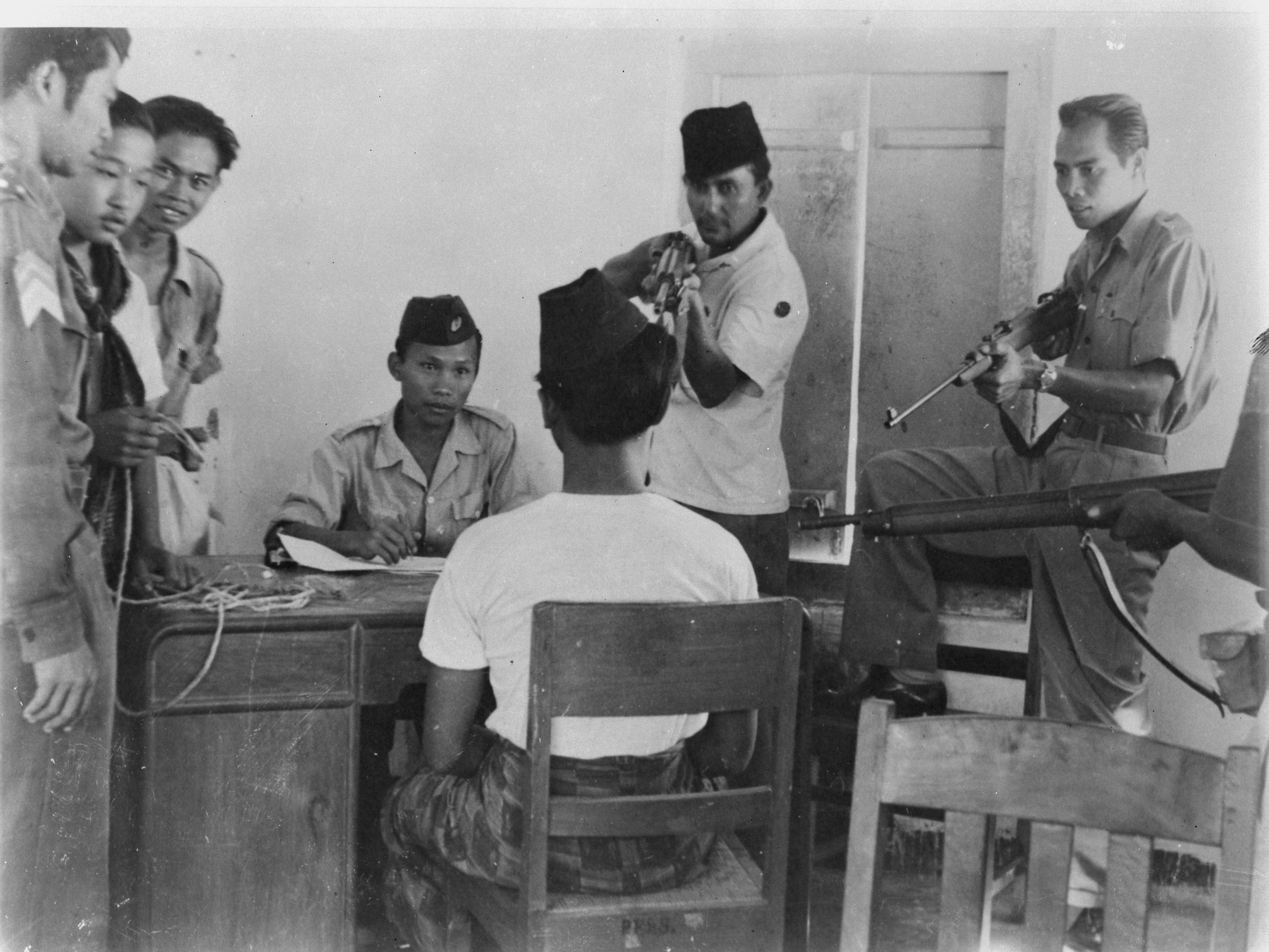 Collectie / Archief : Fotocollectie Dienst voor Legercontacten Indonesië Reportage / Serie : [DLC] Foto's gedode communisten door de TNI [gemaakt te Madioen, september 1948] Beschrijving : I[ndonesische man op de rug gezien wordt ondervraagd en onder schot gehouden in een kantoor.Om hem heen een aantal Indonesische mannen] Datum : september 1948 Locatie : Indonesië, Nederlands-Indië Fotograaf : Fotograaf Onbekend / DLC Auteursrechthebbende : Nationaal Archief Materiaalsoort : Negatief (zwart/wit) Nummer archiefinventaris : bekijk toegang 2.24.04.02 Bestanddeelnummer : 8803